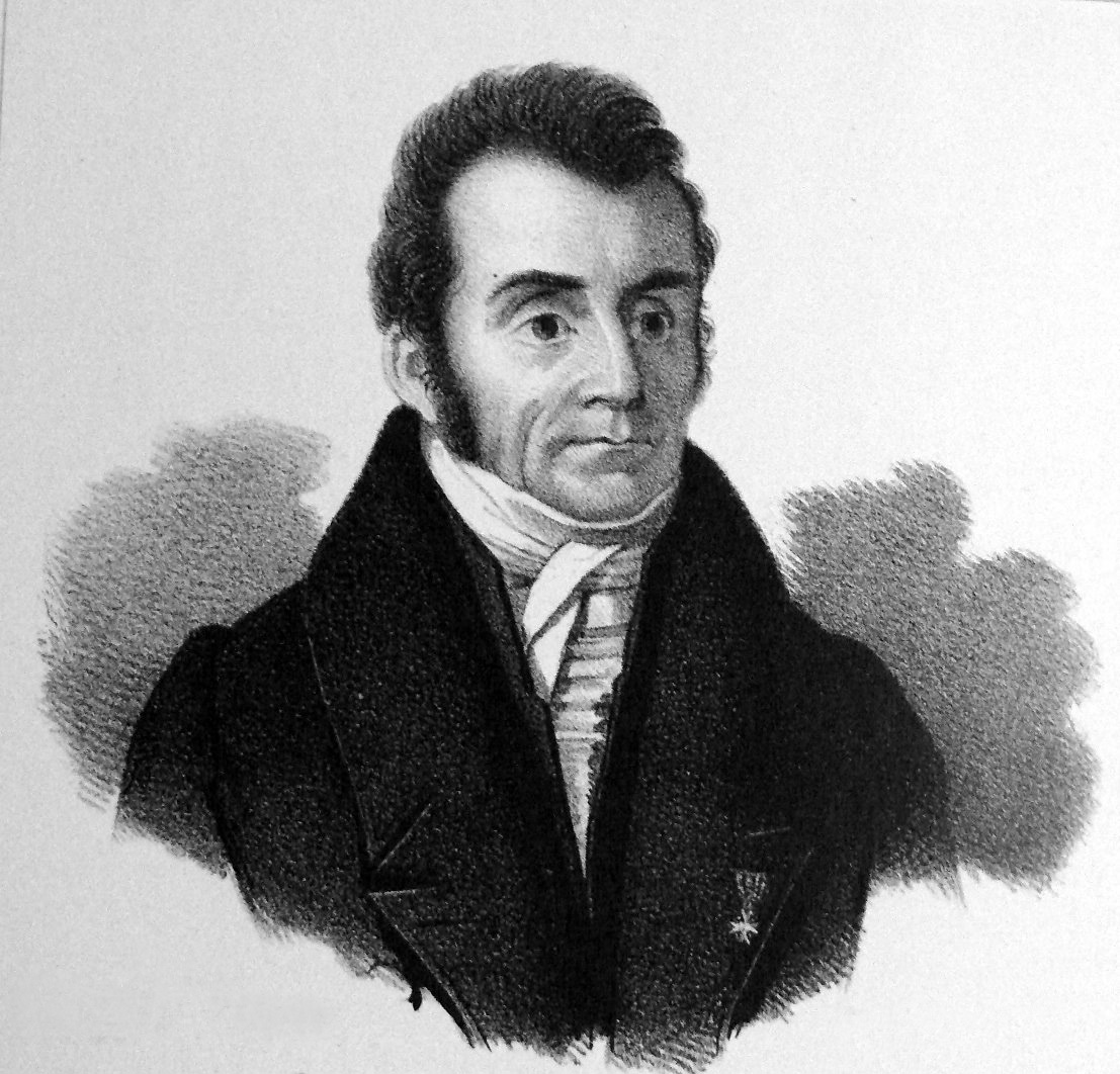 Christian Adolf Deutrich (1783 - 1839), ehemaliger Bürgermeister von Leipzig